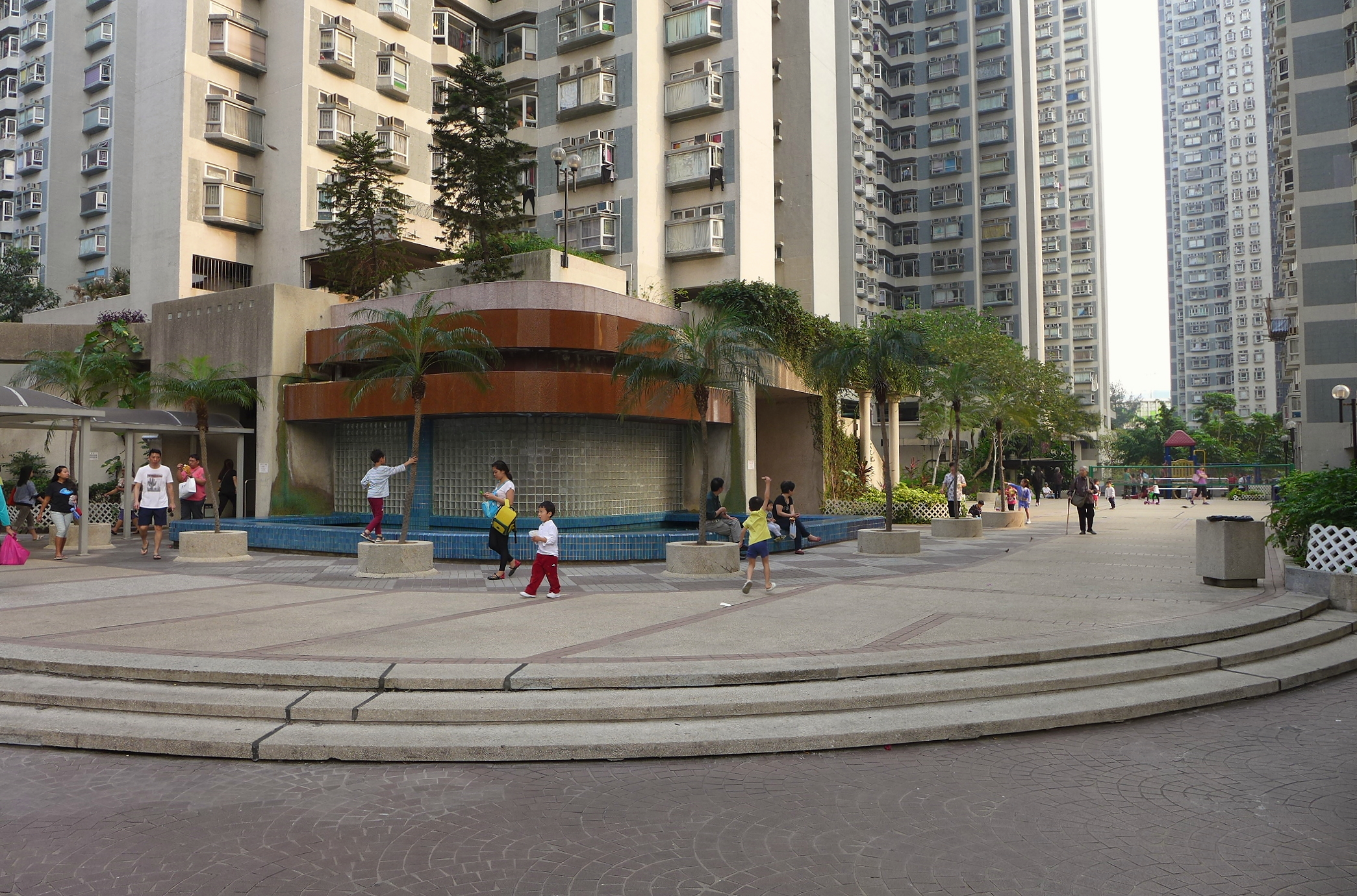 Riviera Gardens Podium